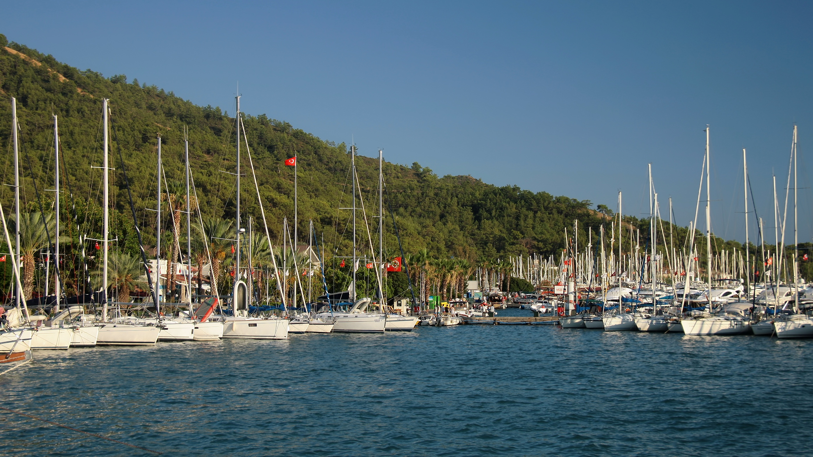 Göcek Belediye Marina